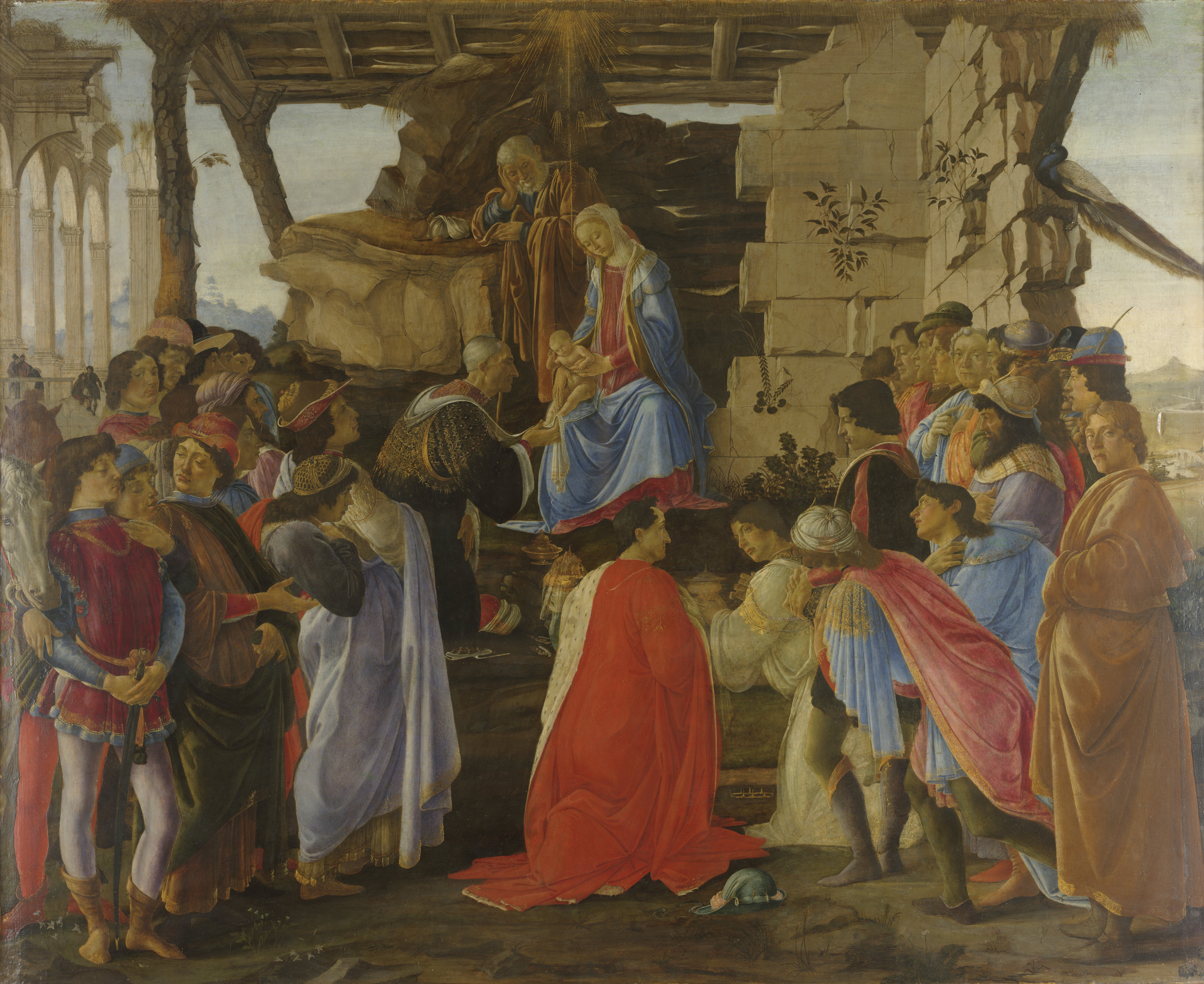 Darstellung der Mitglieder der Medici-Familie als Könige: Cosimo (kniend), Piero de' Medici und Giovanni (Rückenfiguren im Mittelpunkt) und Angehörige des Medici-Hofes